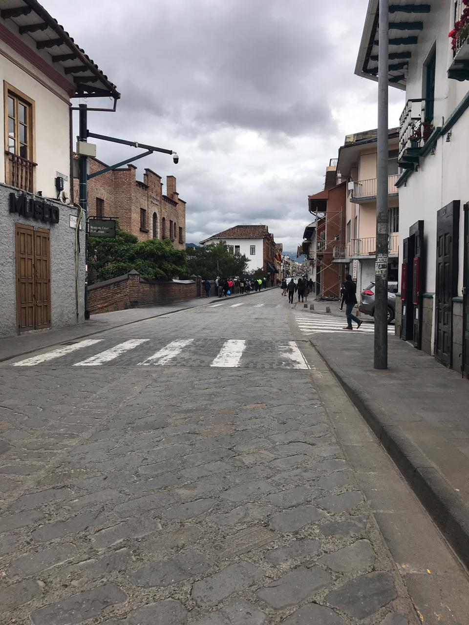 Calle larga - Escalinatas